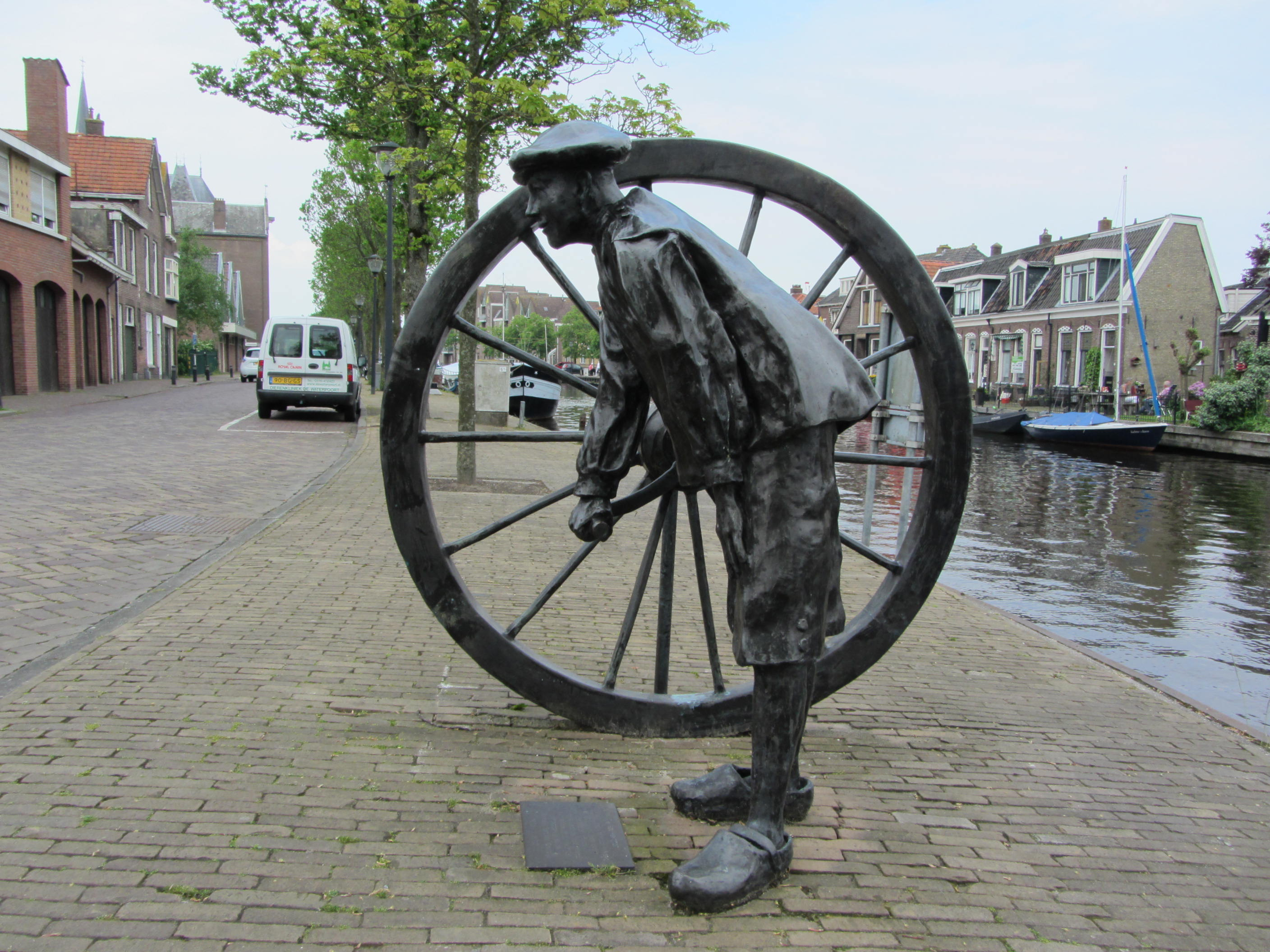 Frans Ram,2003